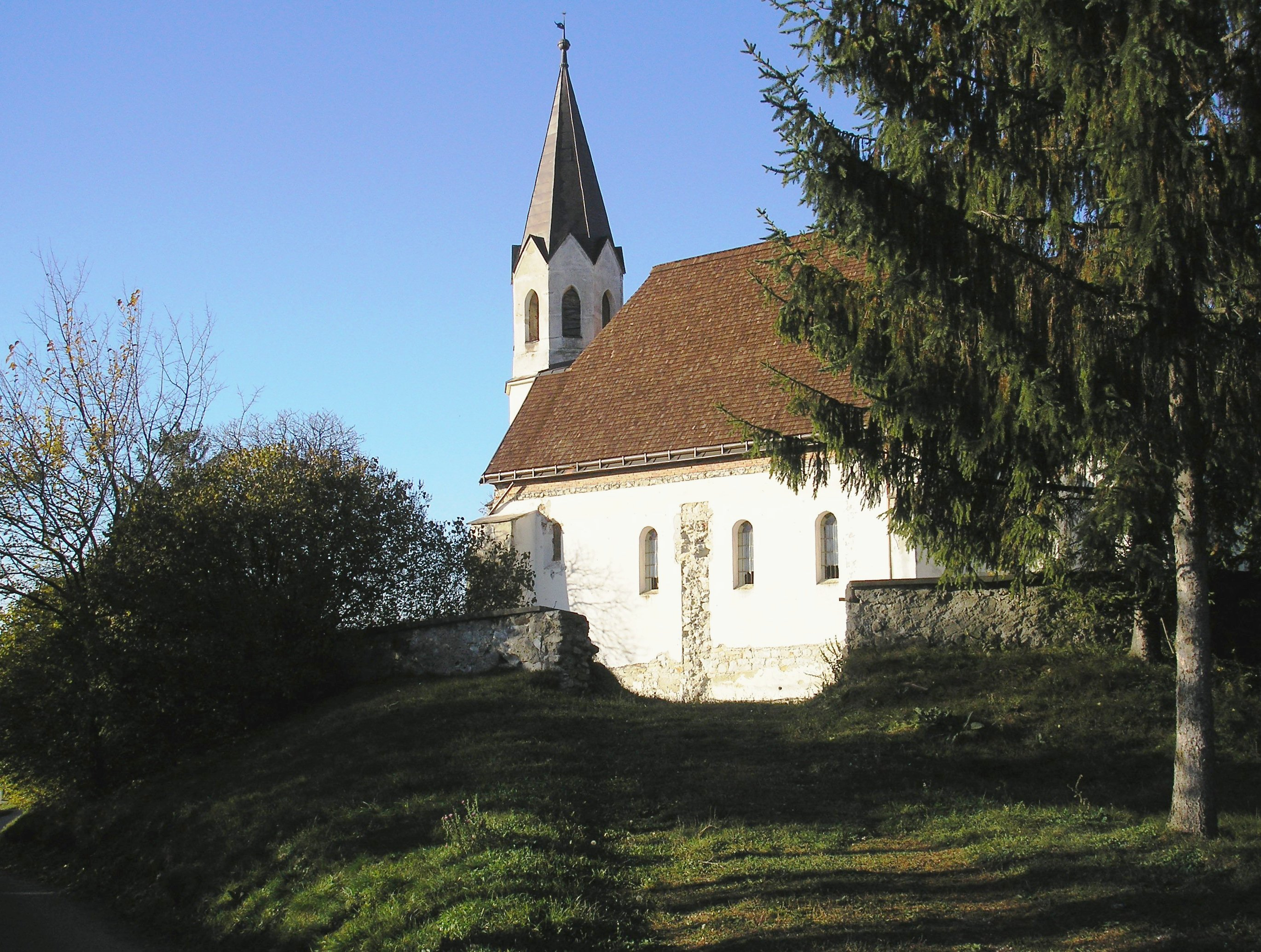 Abaújvár református templom